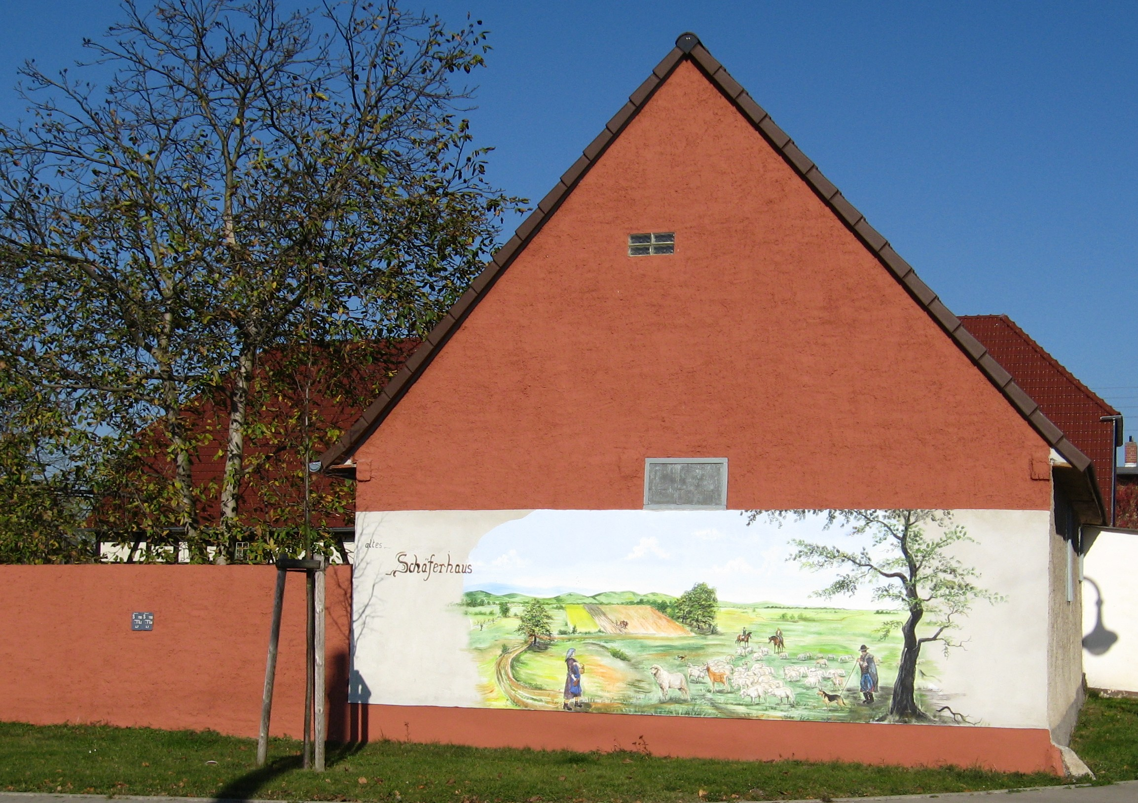 Wandmalerei am Schäferhaus in Libbesdorf. - OpenStreetMap(Info)